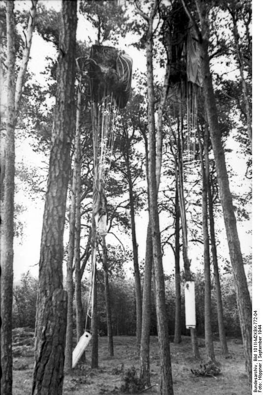 [Niederlande] Arnheim, September 1944 Vorbeigeworfen! Auch bei schlechtem Wetter mußten die Briten Nachschub in ihren bedängten Kessel bei Arnheim werfen. Der Wind wehte die Lastenschirme hinter unsere Linien. PK: 2. M.K.B.K. Höppner [Scherl Bilderdienst]